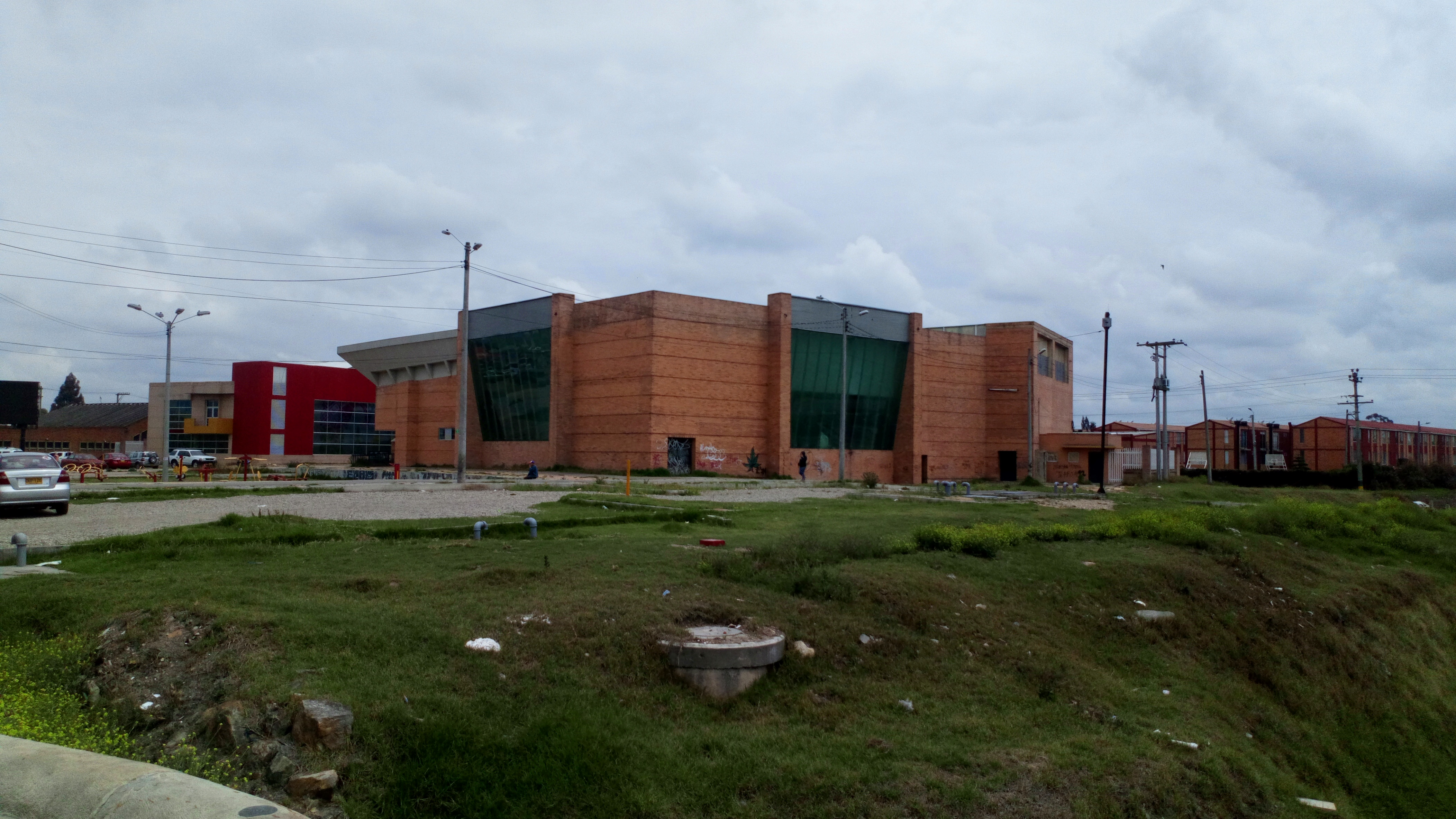 Auditorio Hernán Echavarría